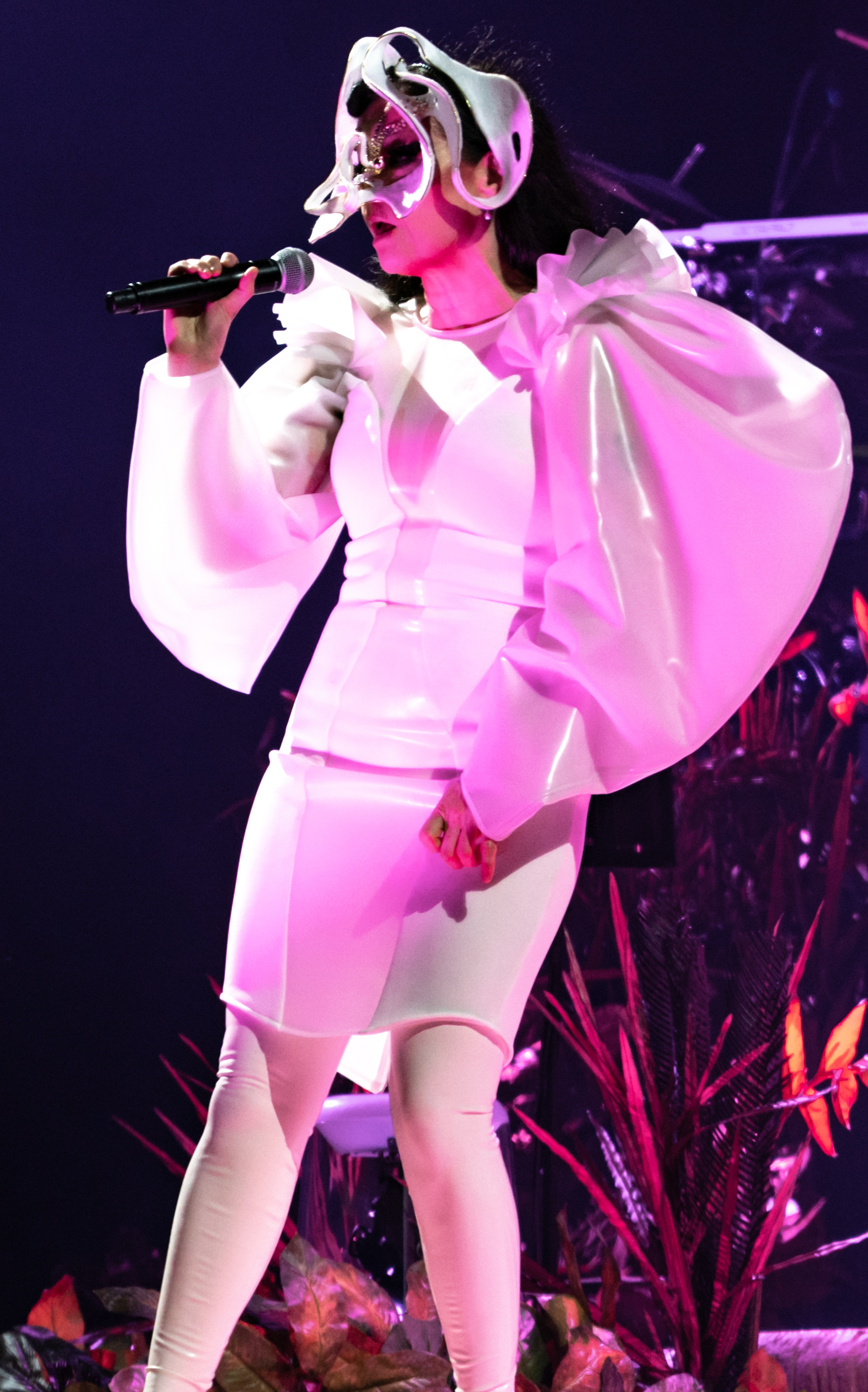 APEVicPark270518-121